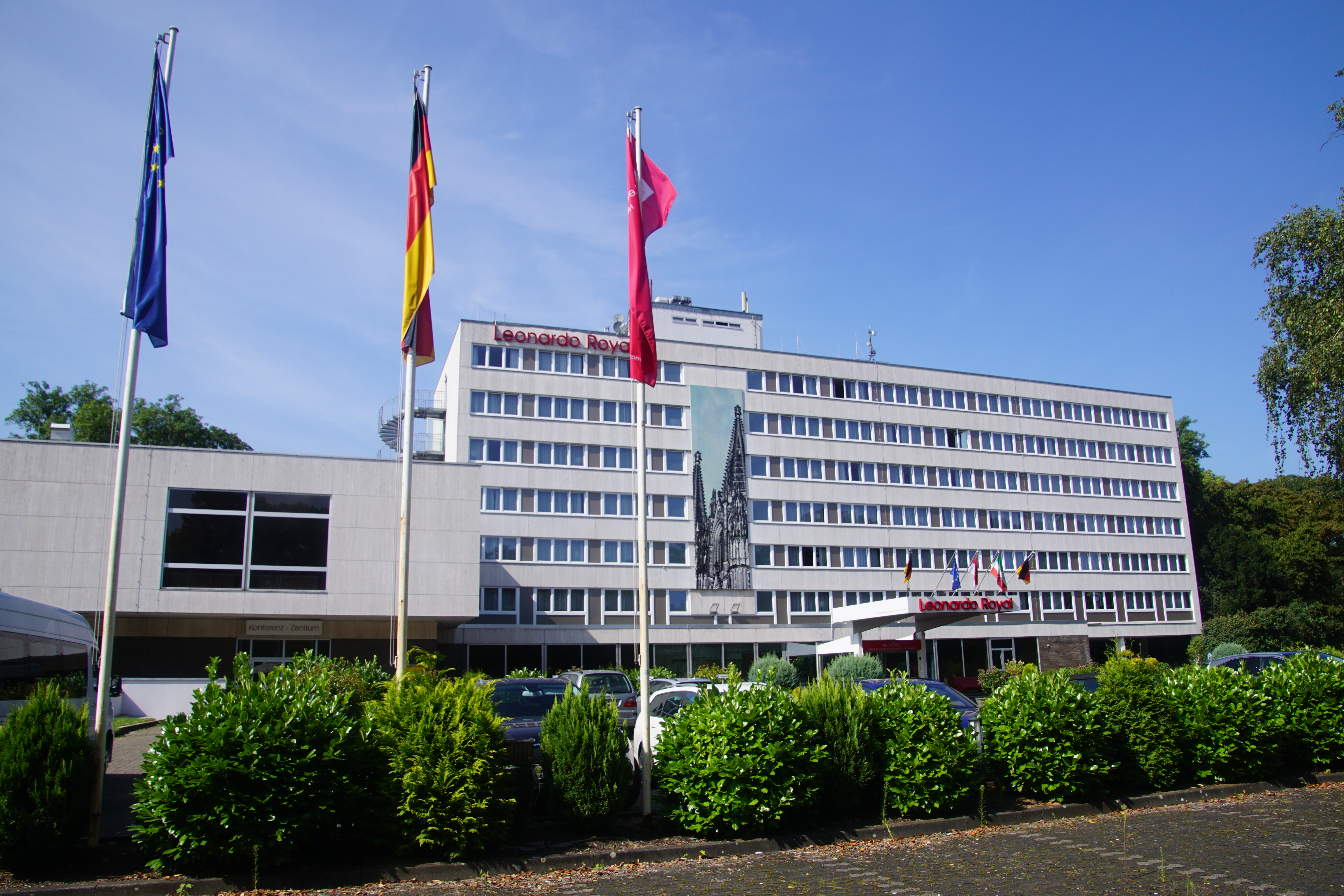 Köln-Lindenthal, Leonardo Royal Hotel Köln